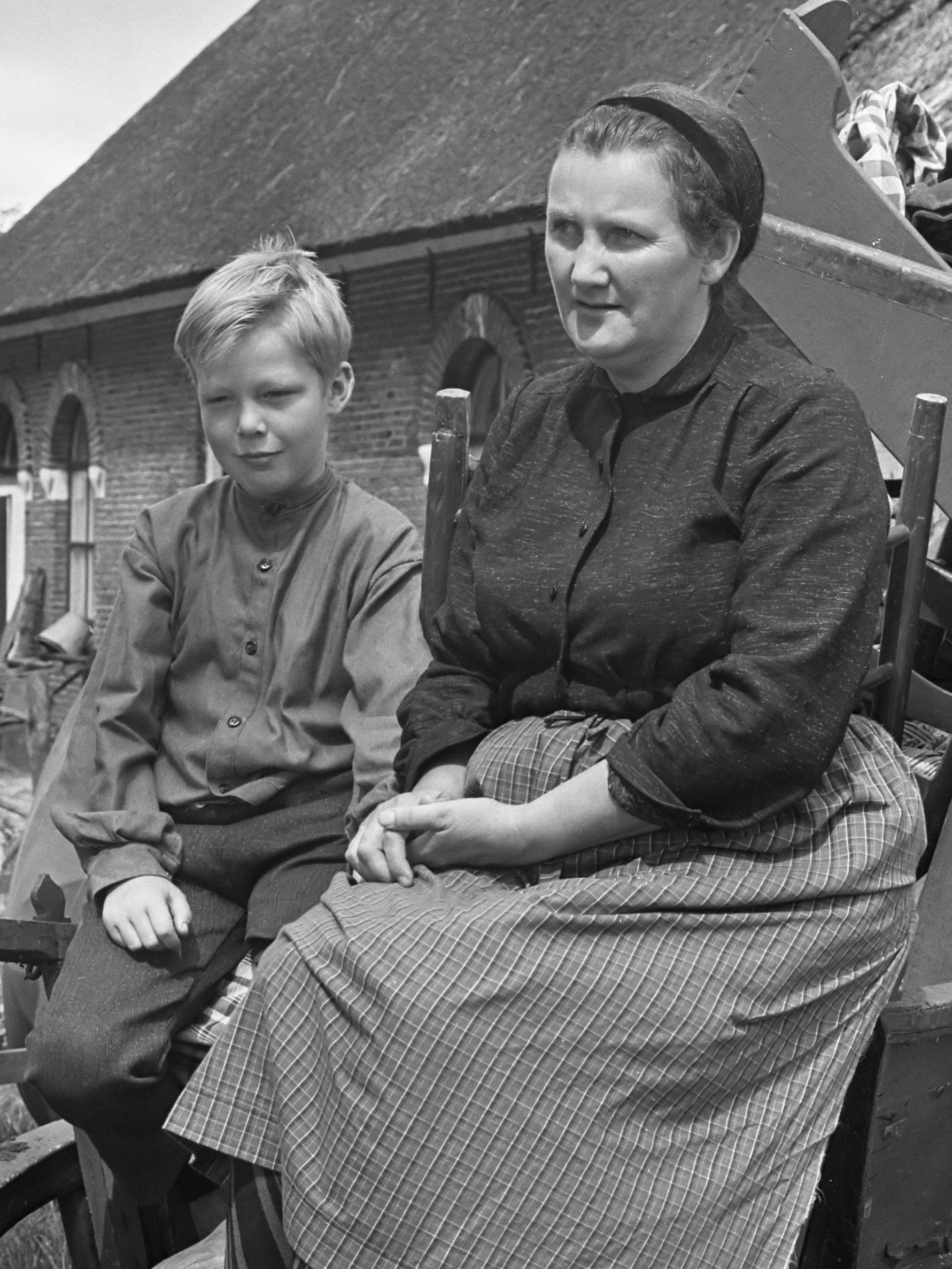 TV-opnamen Bartje in Sleen, Jan Krol als Bartje en mevrouw Weurding als moeder van Bartje` 31 juli 1972